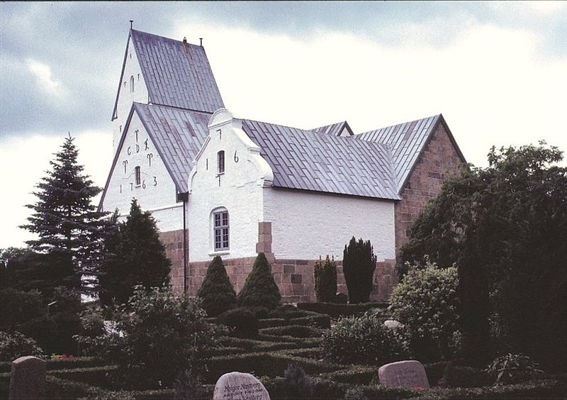 Ulfborg Kirke i Danmark. Ulfborg kirke